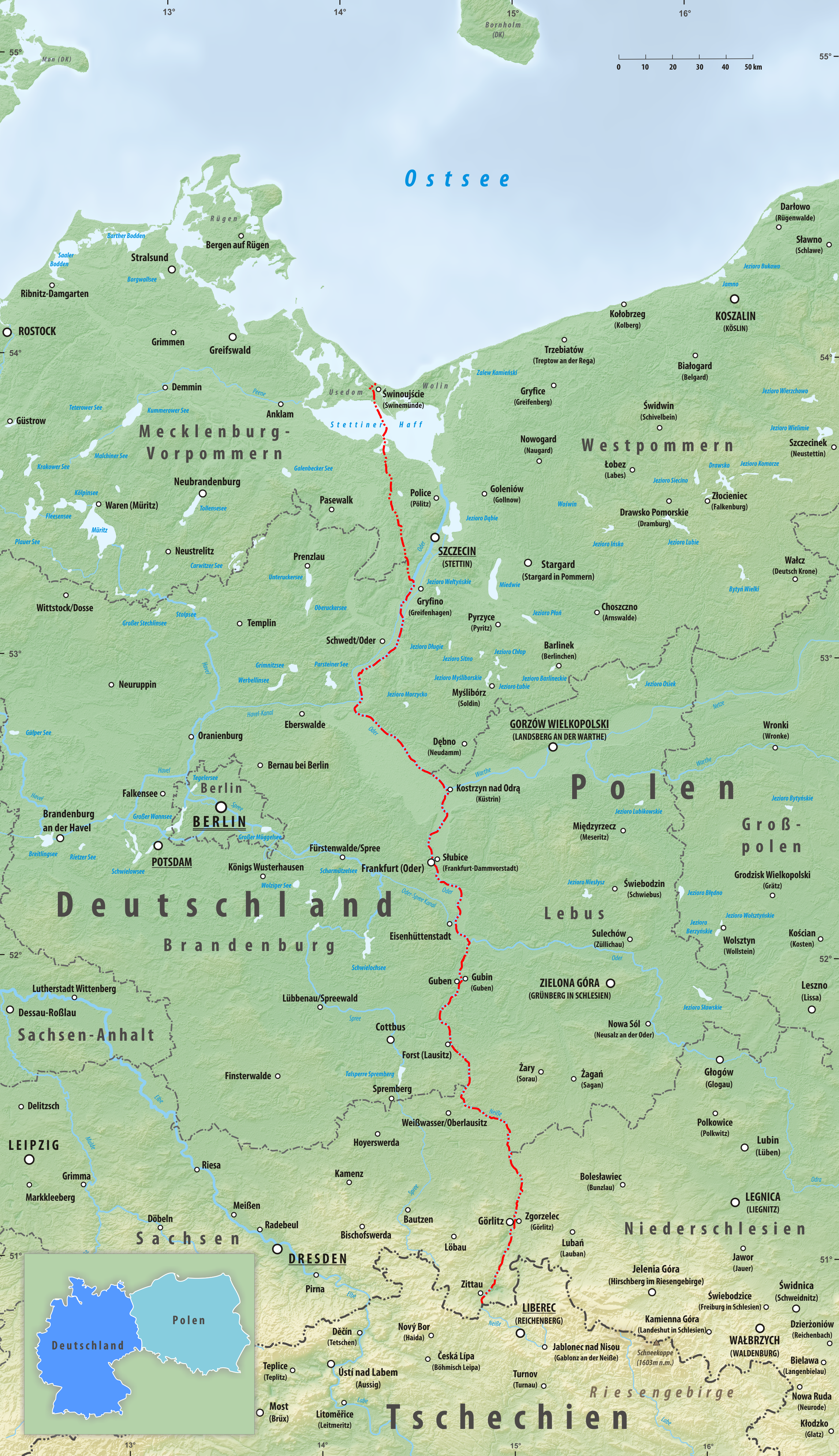 Reliefkarte des Grenzverlaufes zwischen Deutschland und Polen Topographischer Hintergrund: NASA Shuttle Radar Topography Mission (public domain). SRTM3 v.2.